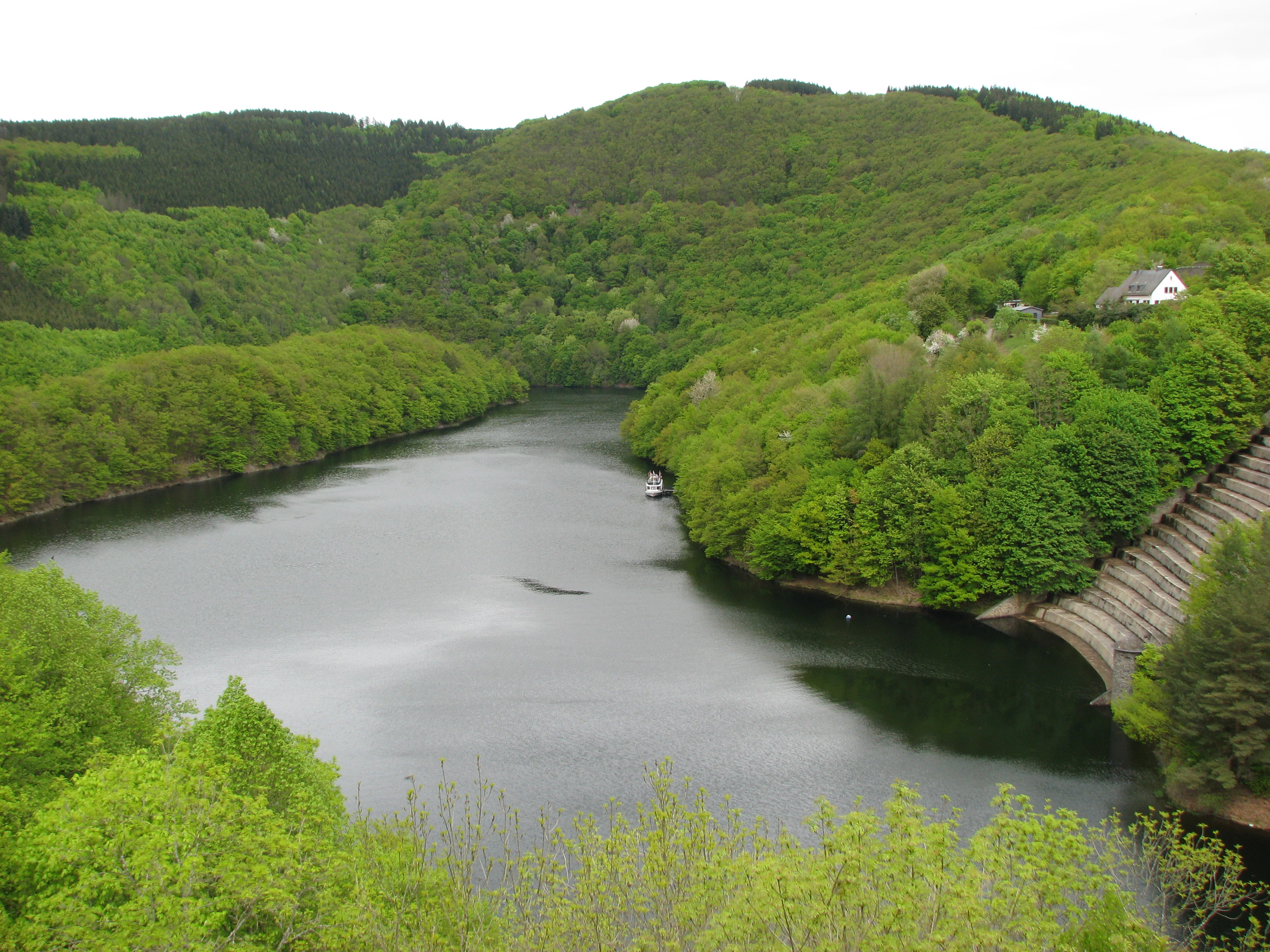 Obersee (Rur) mit dem Fahrgastschiff St. Nikolaus am Schiffsanleger Urftseestaumauer. Links im Bild sind die Betonstufen des Überlaufs der Urftseestaumauer und das Haus des Talsperrenwärters zu sehen.